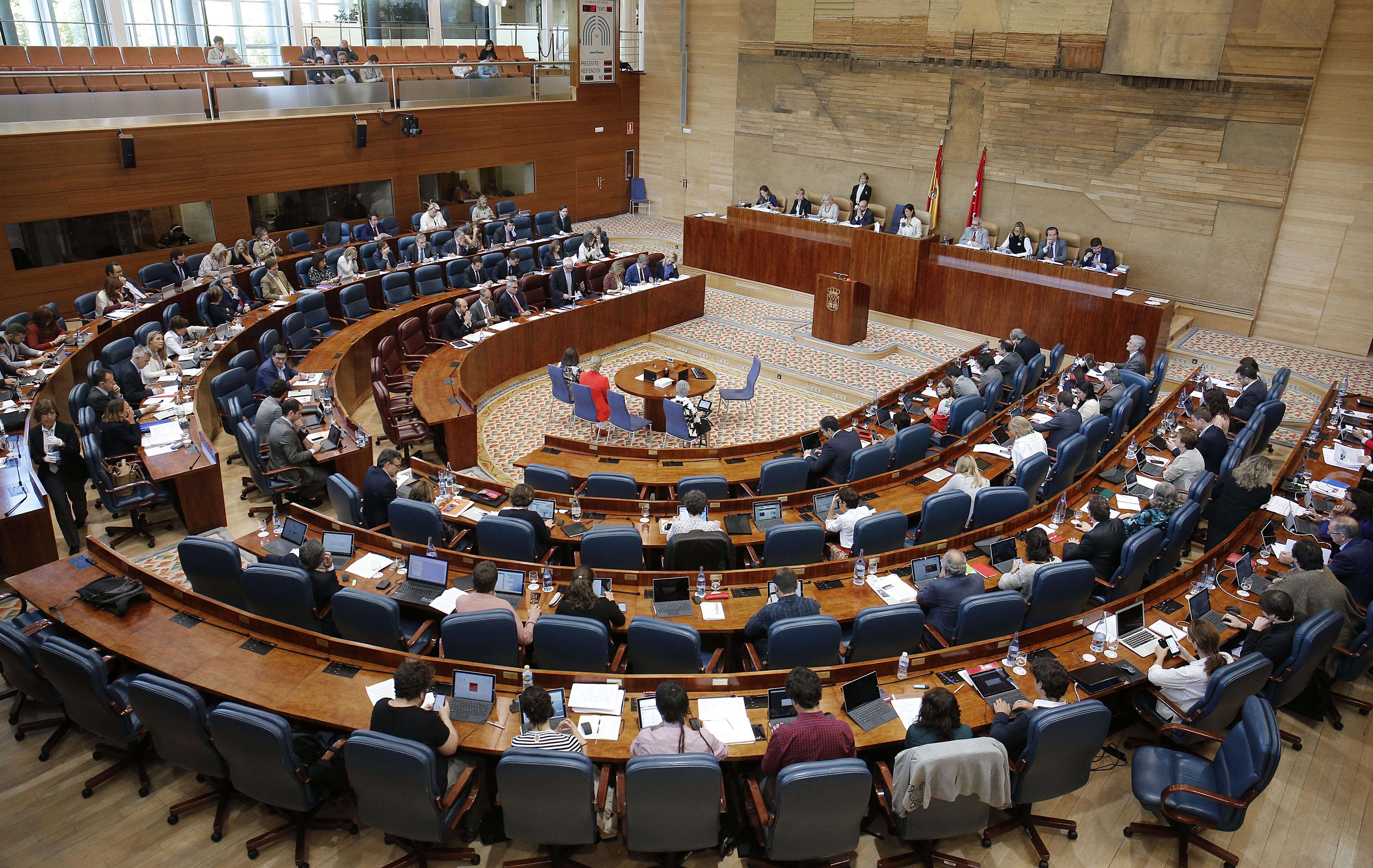 PLENO DE LA ASAMBLEA DE MADRID Foto: D.Sinova / Comunidad de Madrid